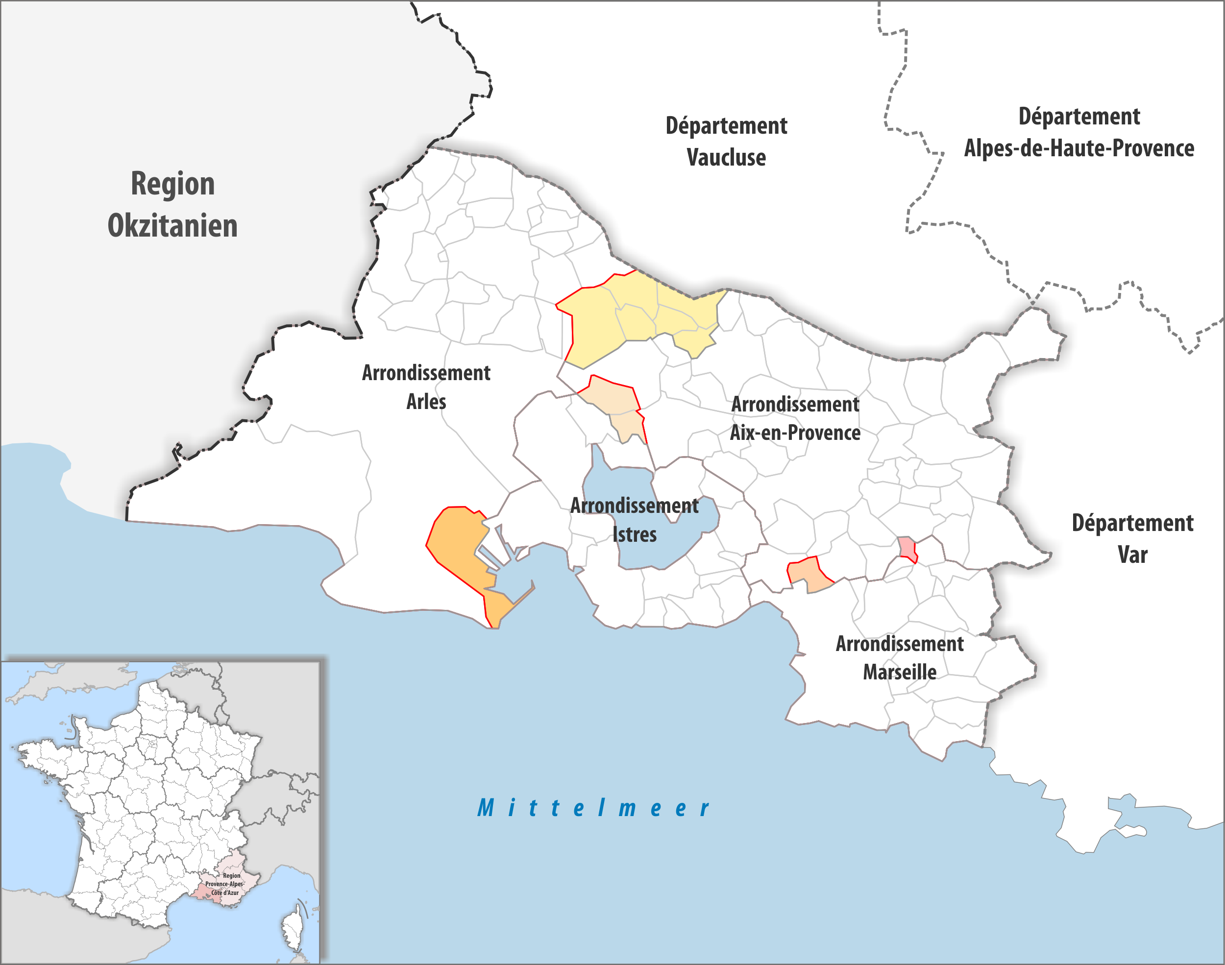 Arrondissements Anpassungen auf 2017 im Departement Bouches-du-Rhône